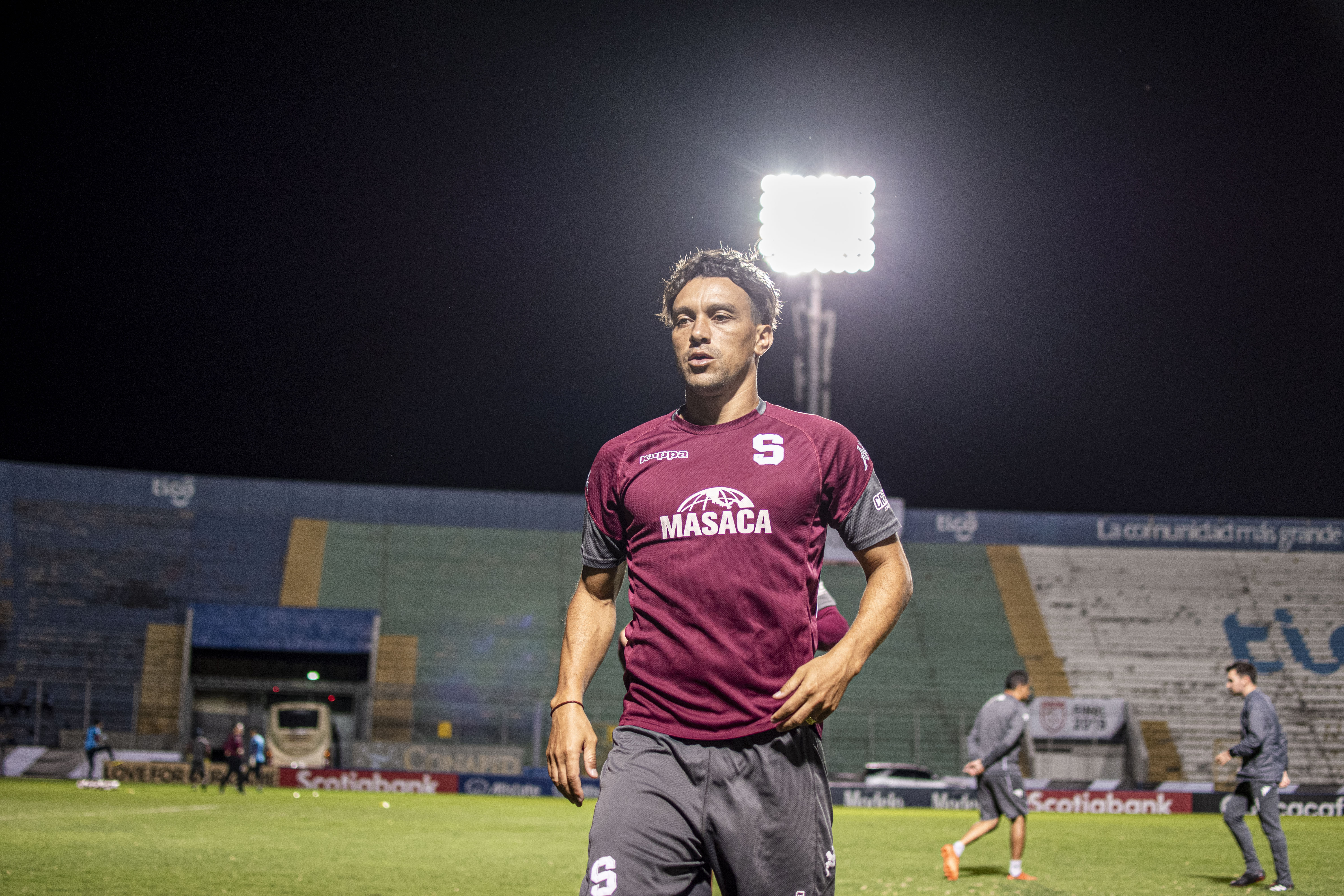 Christian Bolaños entrena previo a la Final de Liga Concacaf 2019, en el Estadio Nacional de Tegucigalpa.